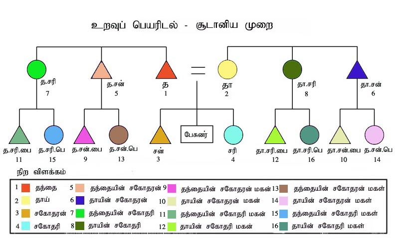 Drawn by the user who uploaded it here.